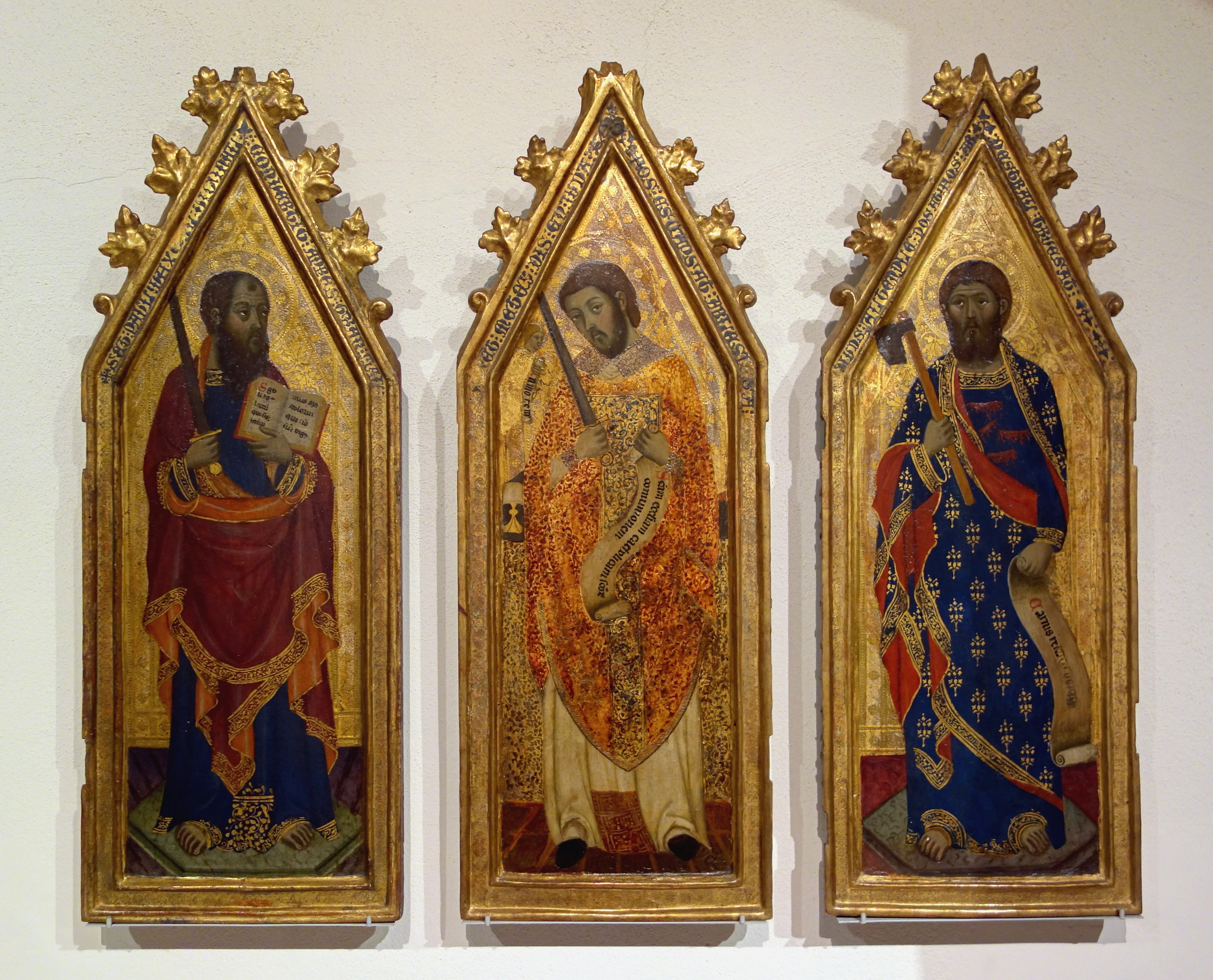 Saint Paul, Saint Mathieu, Saint Juleslabel QS:Lfr,"Saint Paul, Saint Mathieu, Saint Jules"